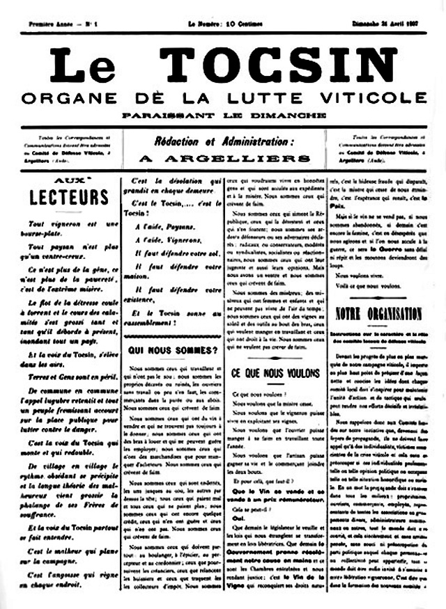 N° 1 du Tocsin